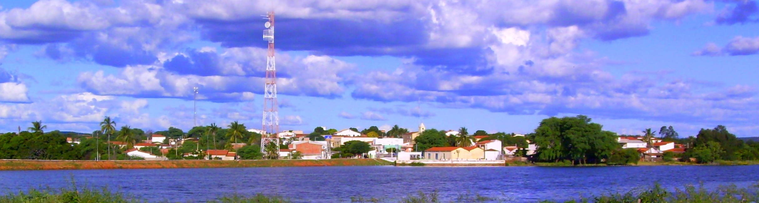 Vista panorâmica do lado sul da cidade de Dirceu Arcoverde